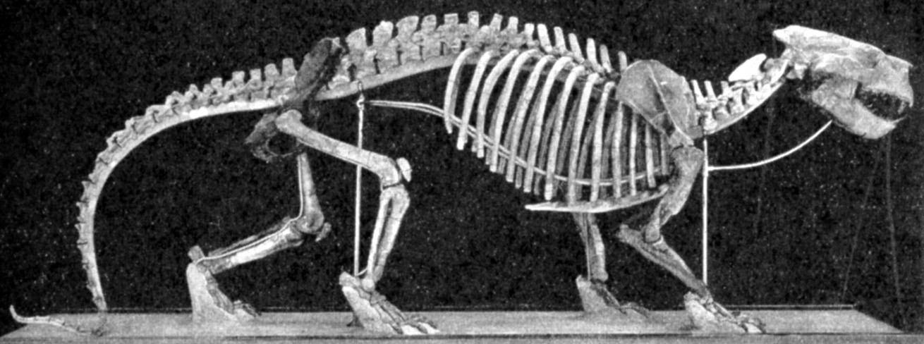 Patriofelis vorax skeleton.